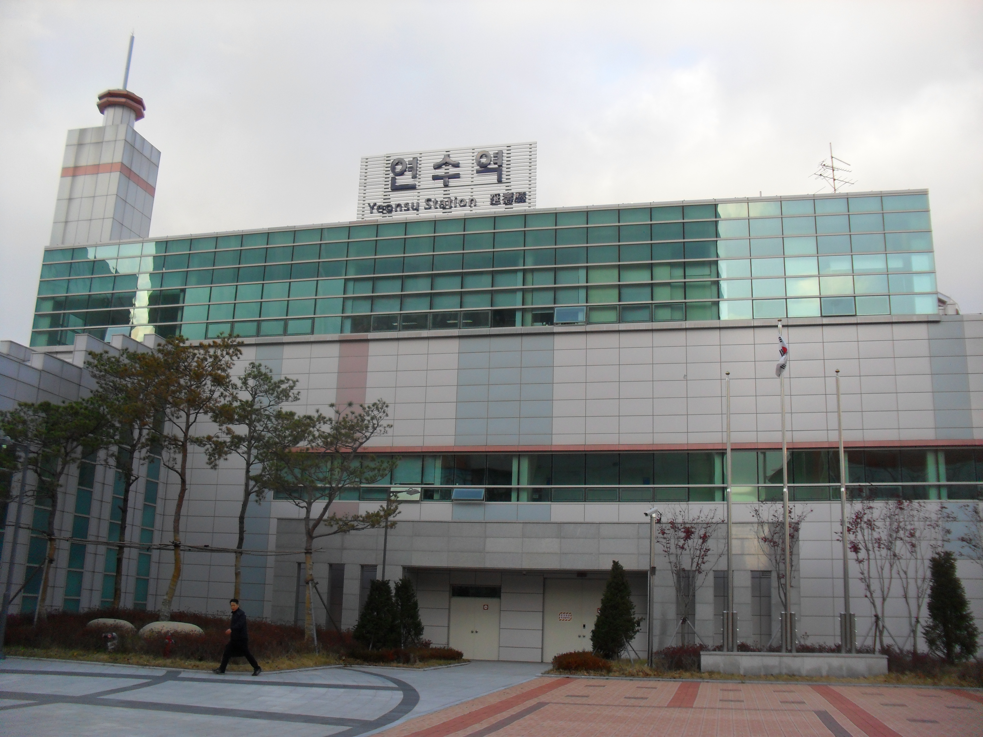 １=수인선 연수역